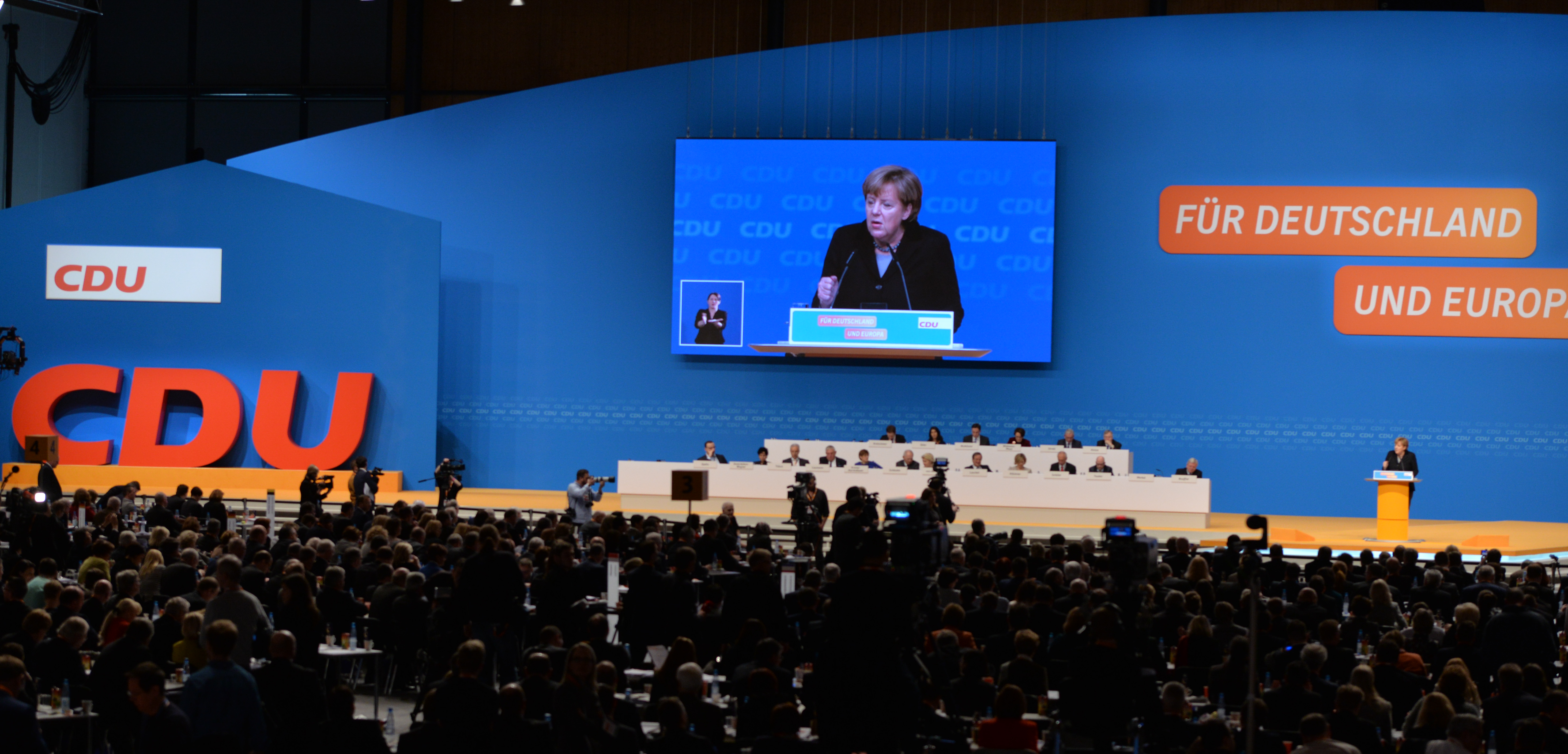 28. Parteitag der CDU Deutschlands am 14. Dezember 2015 in Karlsruhe28. Parteitag der CDU Deutschlands am 14. Dezember 2015 in Karlsruhe